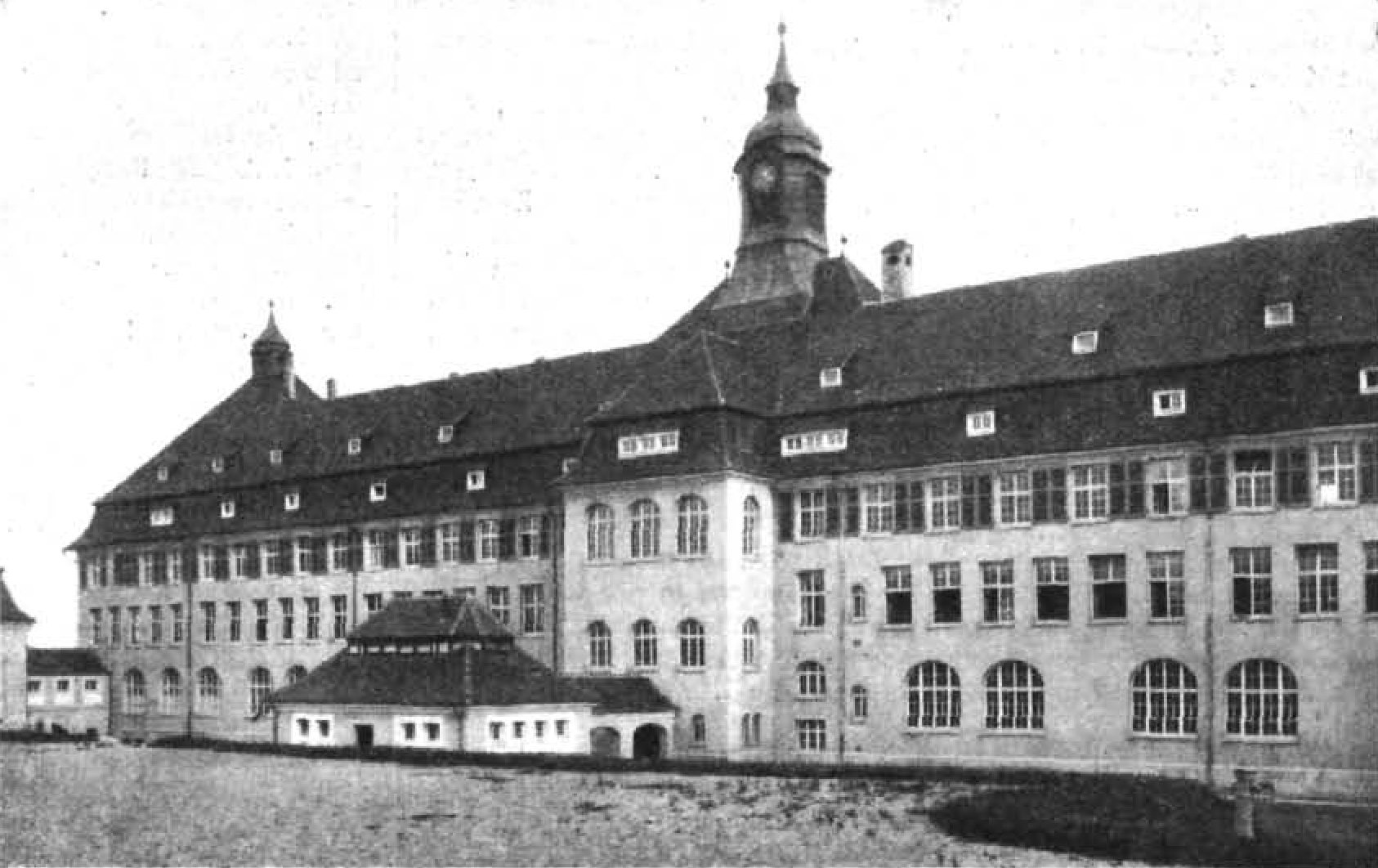 Lehrerseminar Backnang, Hofansicht